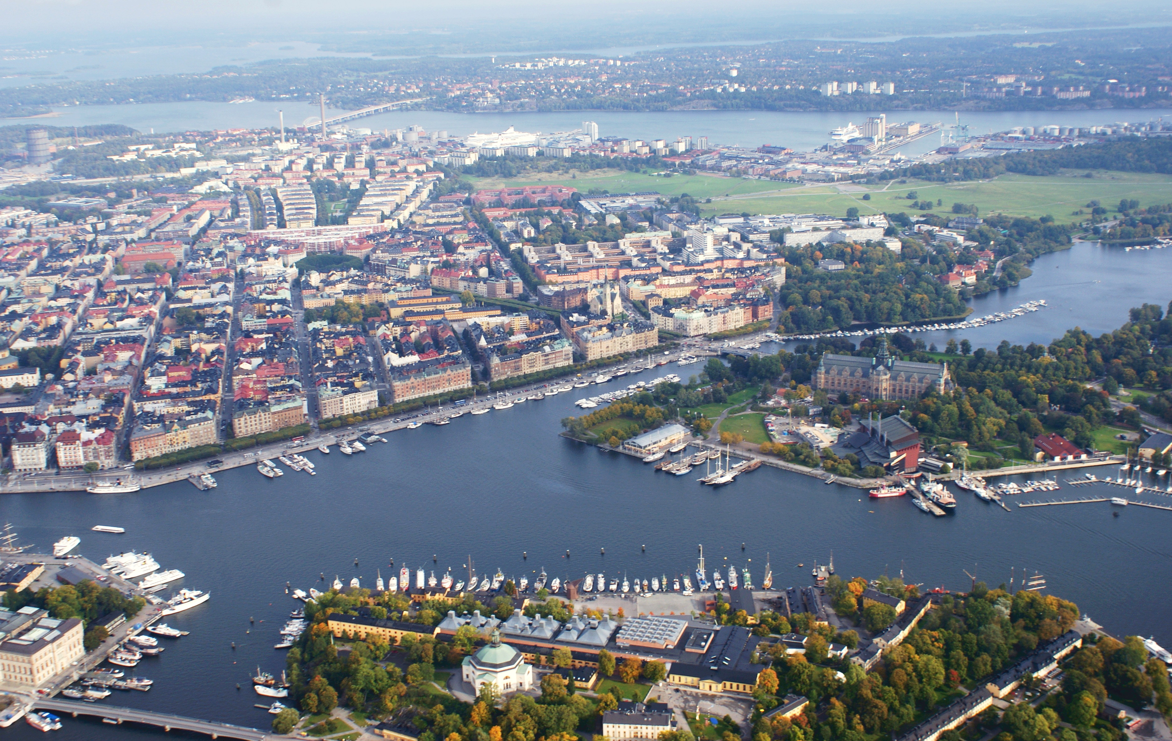 Östermalm, Nybroviken och Gärdet sedd från helikopter. I bakgrunden syns Lidingö.